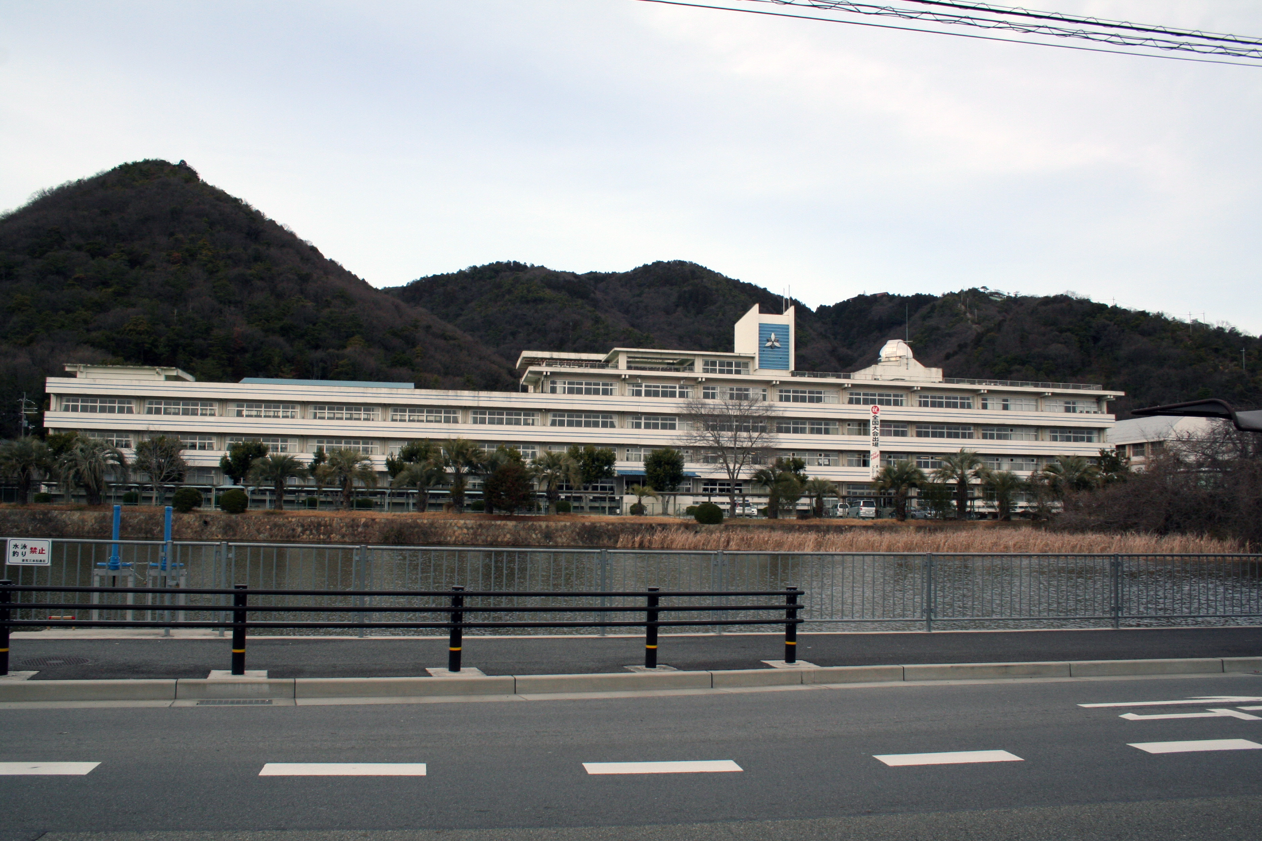 兵庫県姫路市にある私立高校「東洋大学付属姫路高等学校」。 南にある池から撮影。